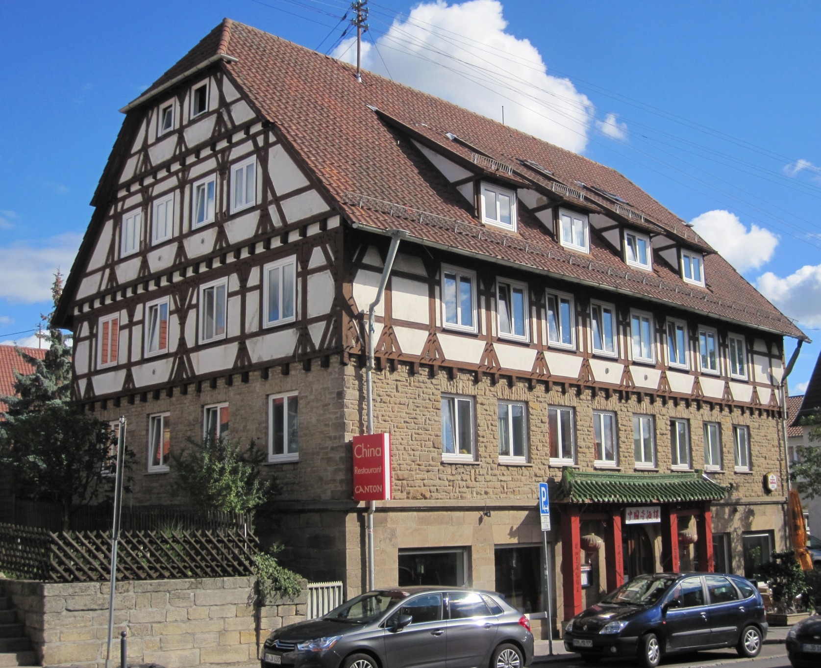 Wohnhaus mit Gaststätte in Leinfelden-Echterdingen, Stadtteil Echterdingen, Hauptstraße 88. Details zum Kulturdenkmal gibt es hier.